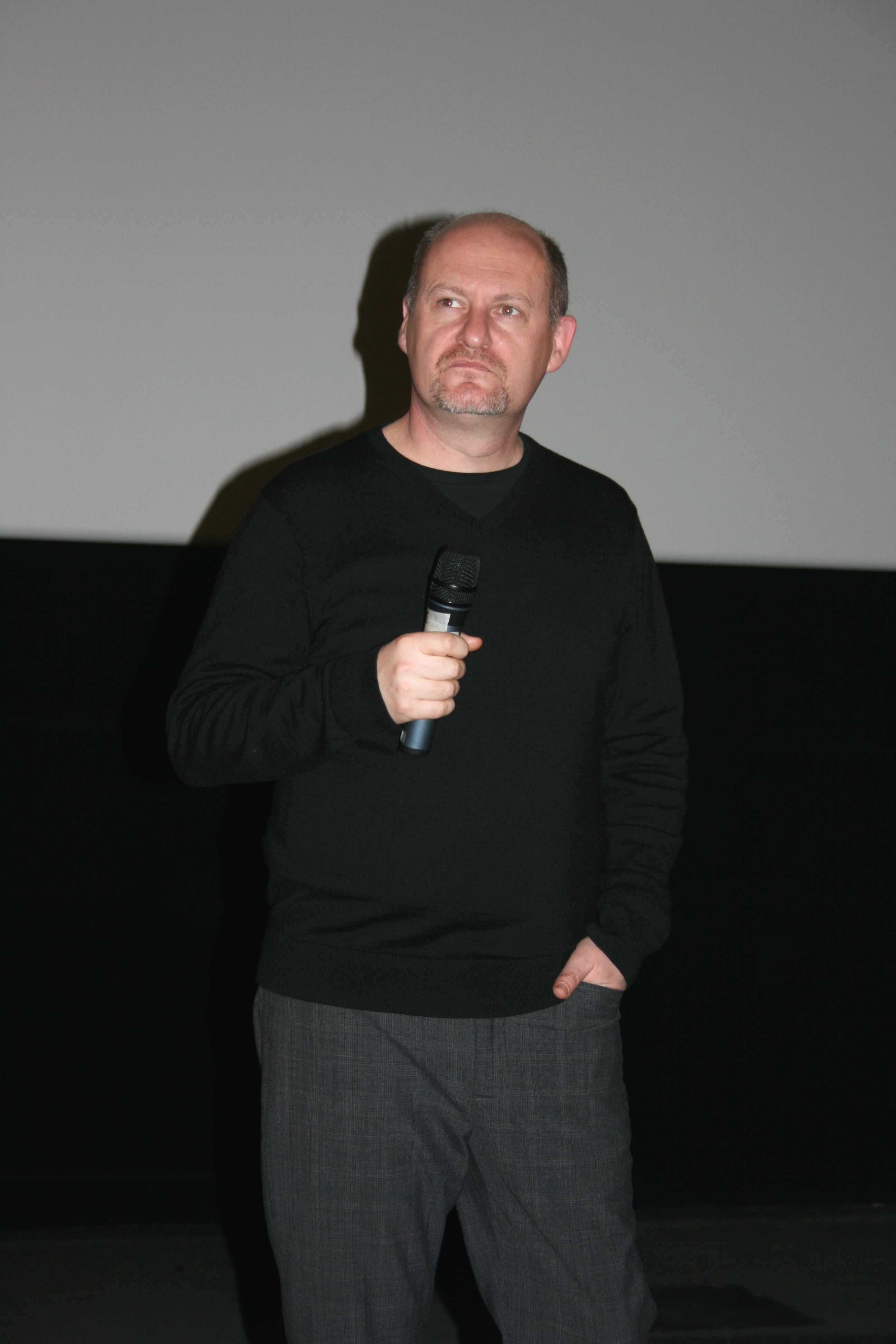 Jean-Paul Salomé à l'avant-première des Femmes de l'ombre diffusée à l'UGC Ciné Cité Les Halles, à Paris.